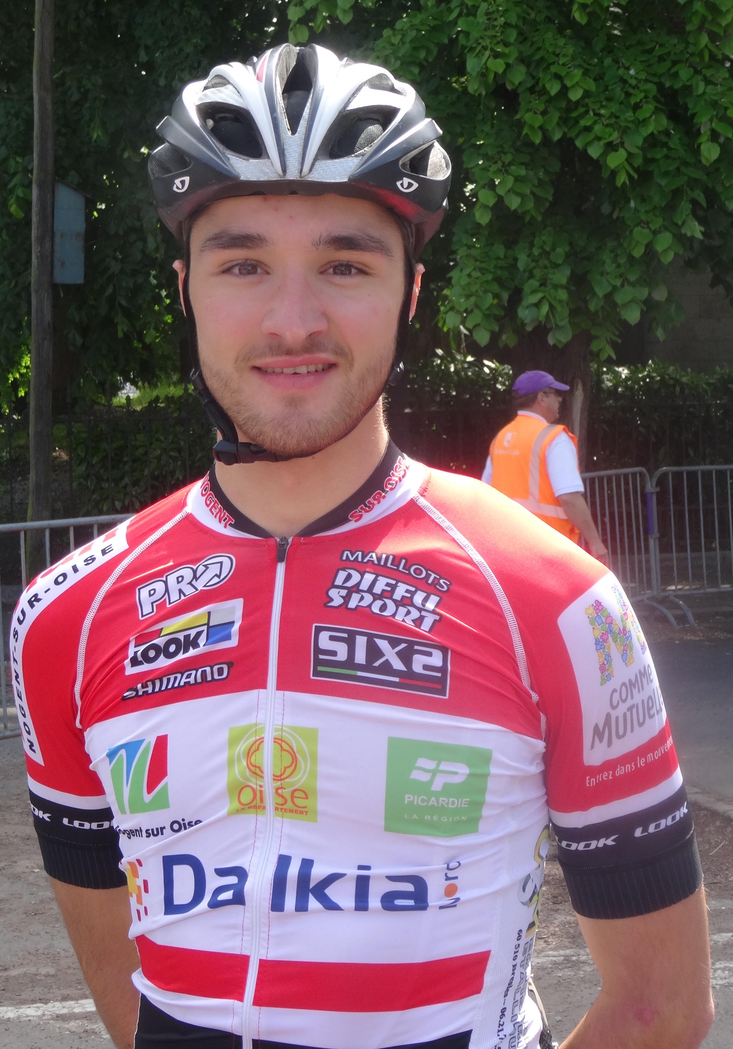 Reportage réalisé le samedi 17 mai à l'occasion du départ du Grand Prix Criquielion 2014 à Boussu, Belgique.